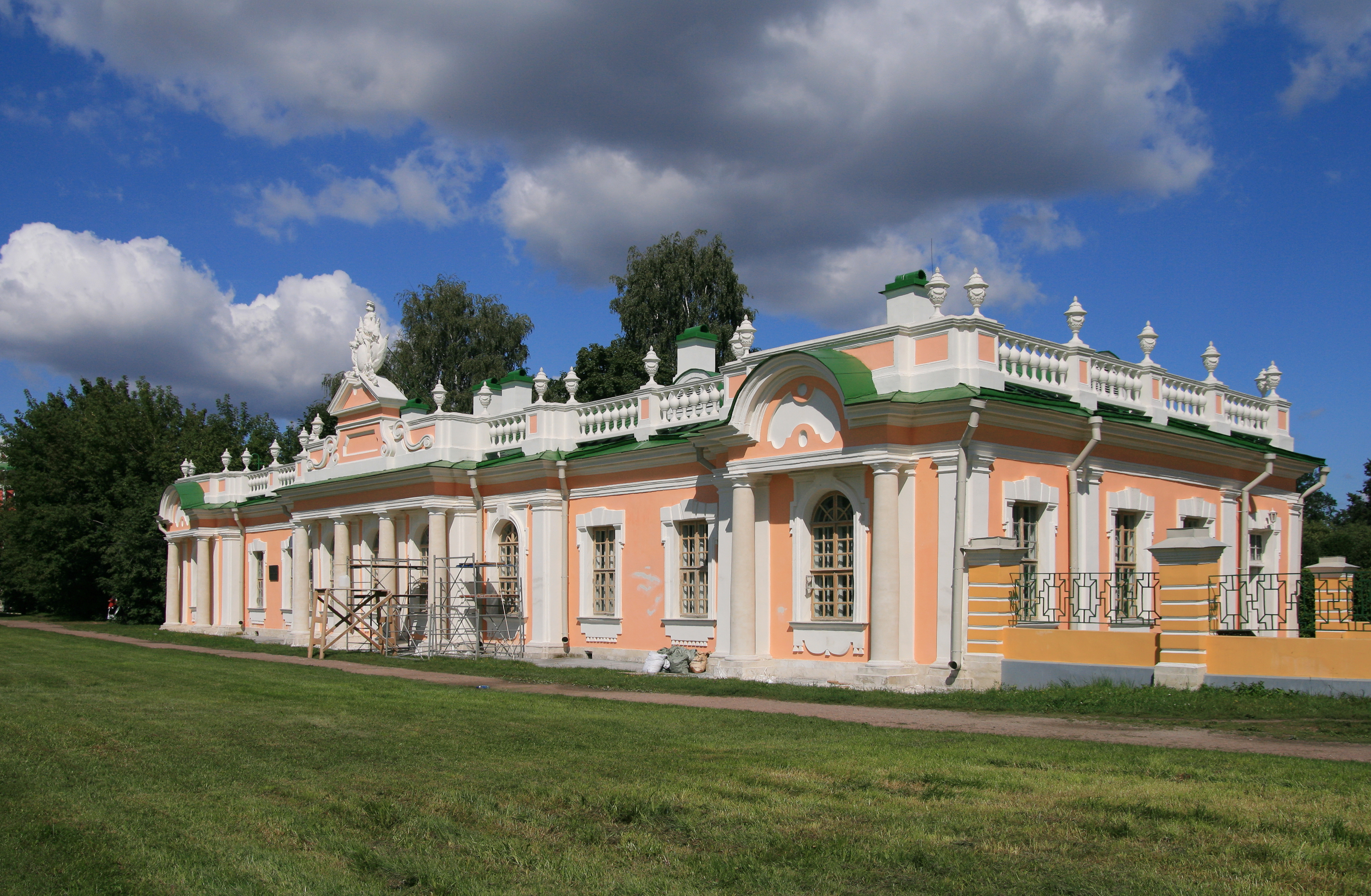 Кухонный флигель в усадьбе Кусково, 1754-1755, арх. Ф.С. Аргунов, Москва